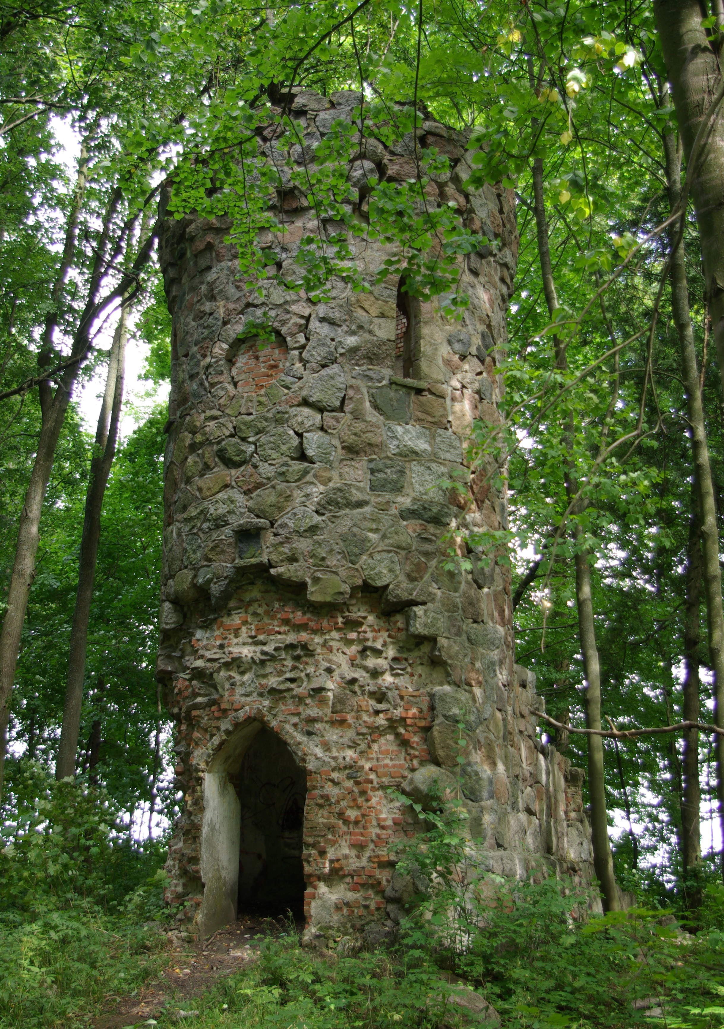 Srokowo